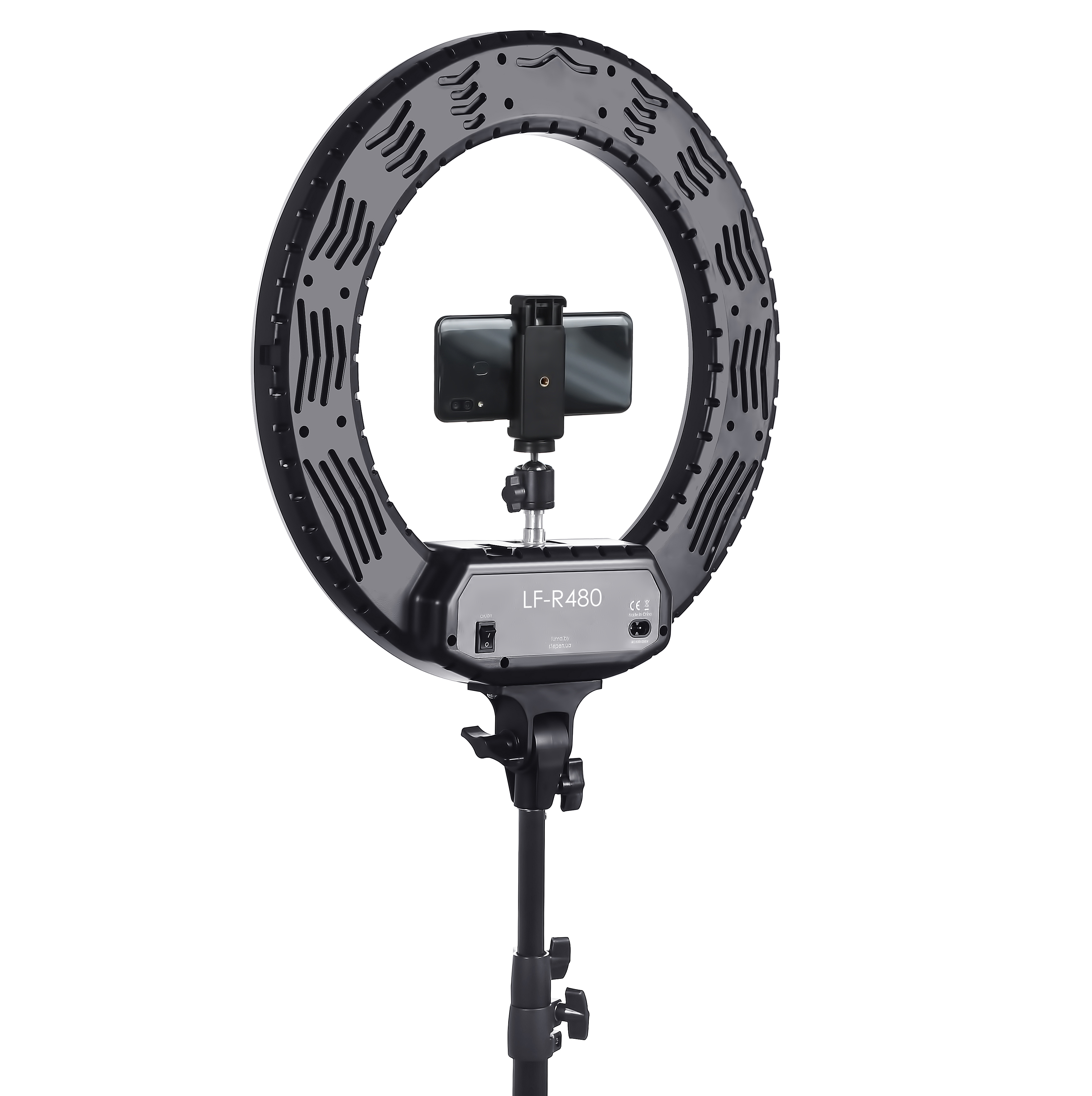 Кольцевой свет подходит не только профессионалам, но и для любителей селфи.